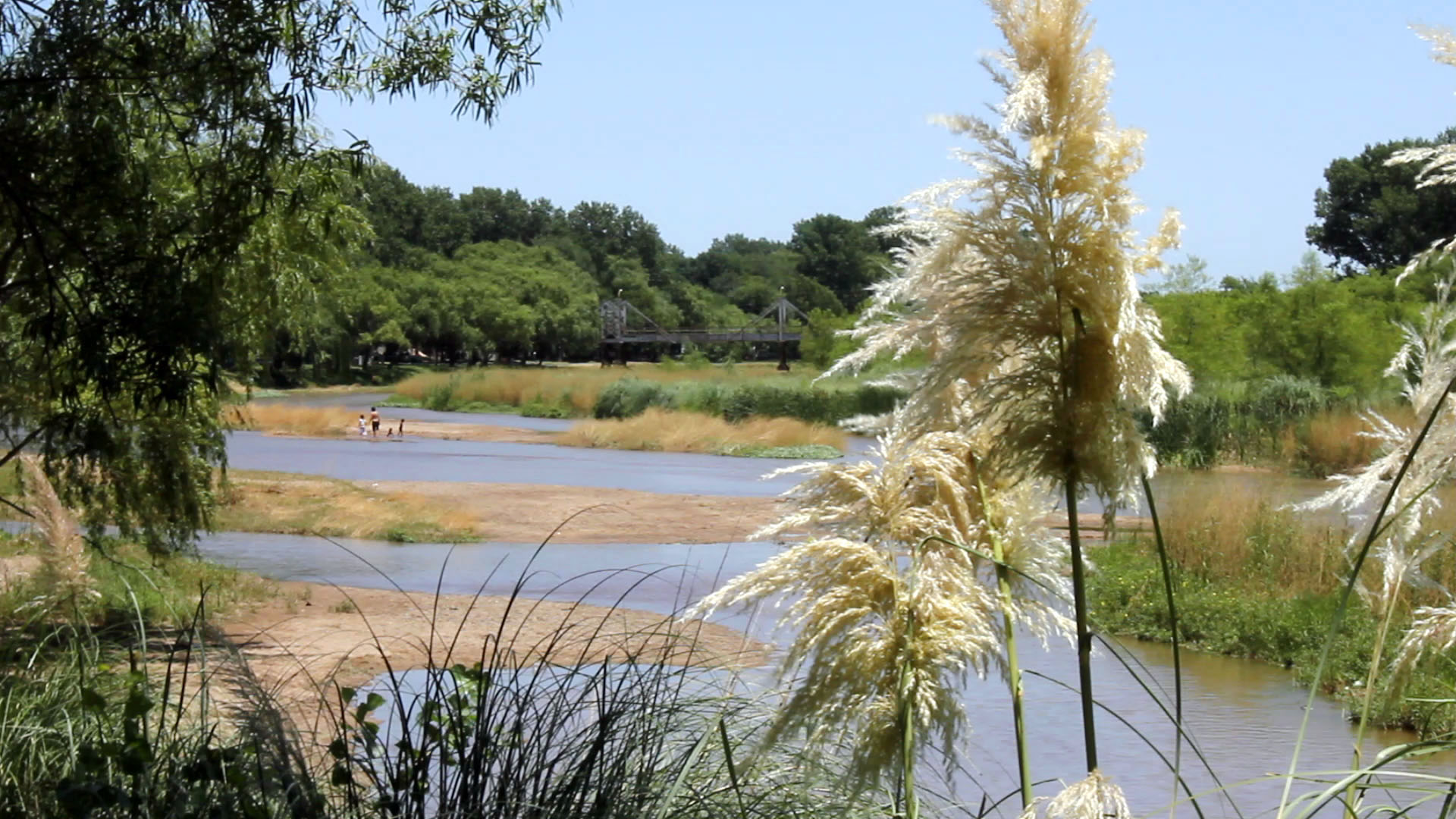 Margenes del rìo Xanaes en la zona de Villa del Rosario